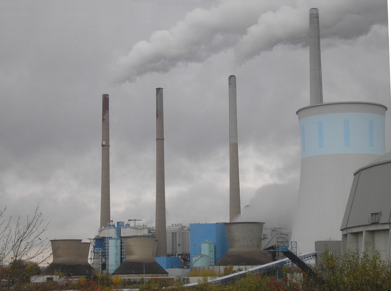 Kühltürme und Schornsteine des Kraftwerks Staudinger. Ganz rechts der 250 Meter hohe Schornstein von Block 4 und dessen sanierter Kühlturm; Block 3, der zum Zeitpunkt der Aufnahme nur noch etwa zwei Monate in Betrieb sein wird, wird durch den zweiten Schornstein von rechts und den dampfenden Kühlturm markiert; ganz links der Kamin von Block 1 und dessen beide Ventilatorkühltürme, rechts daneben die Äquivalente von Block 2.